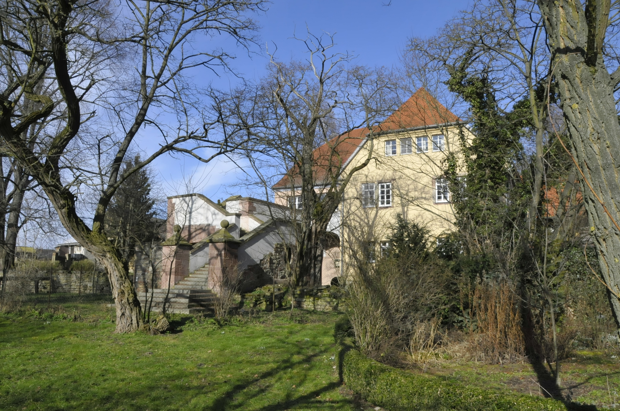 Braunsroda